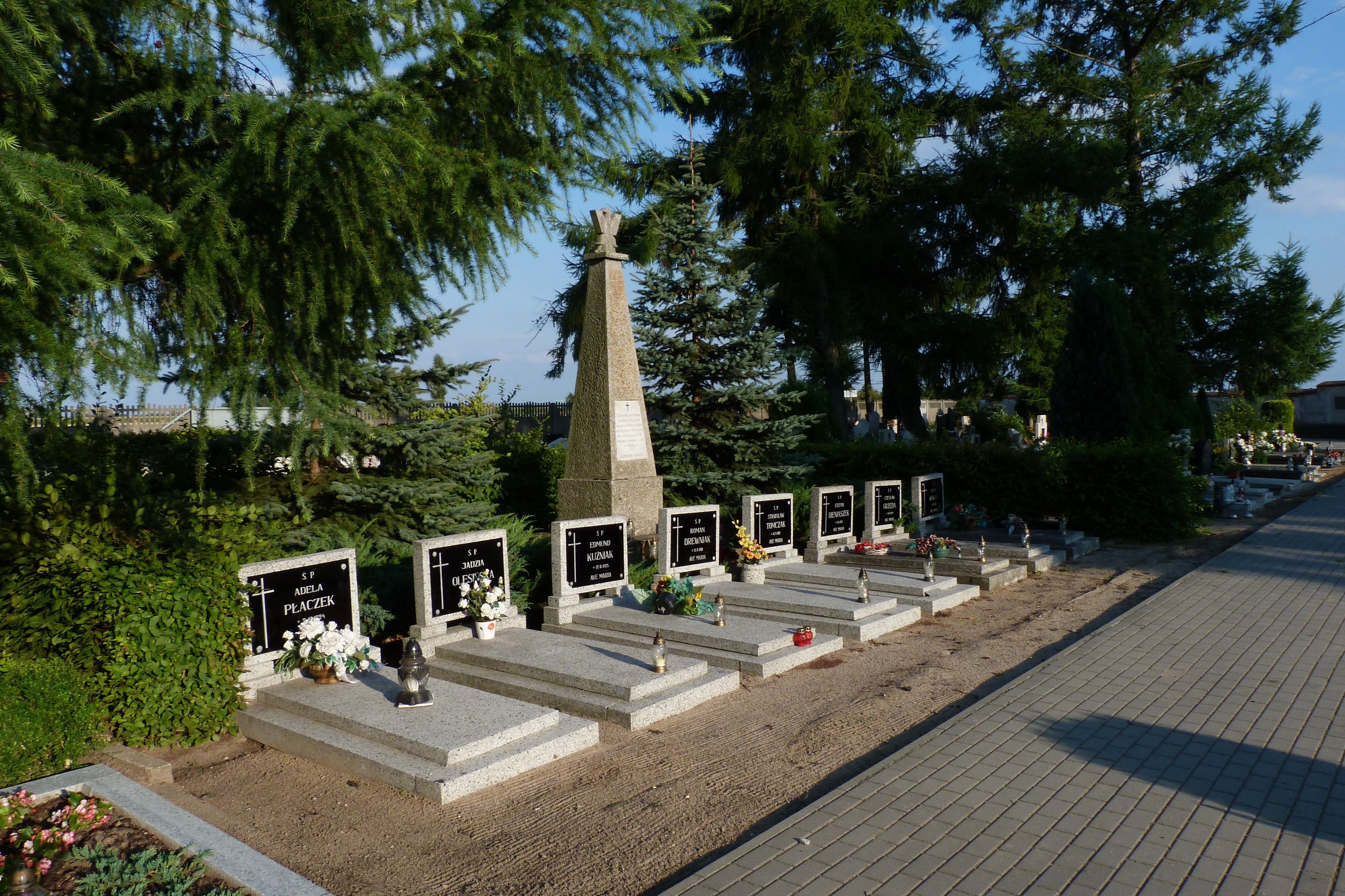 Mogiły ofiar egzekucji w Rydzynie 29 stycznia 1945